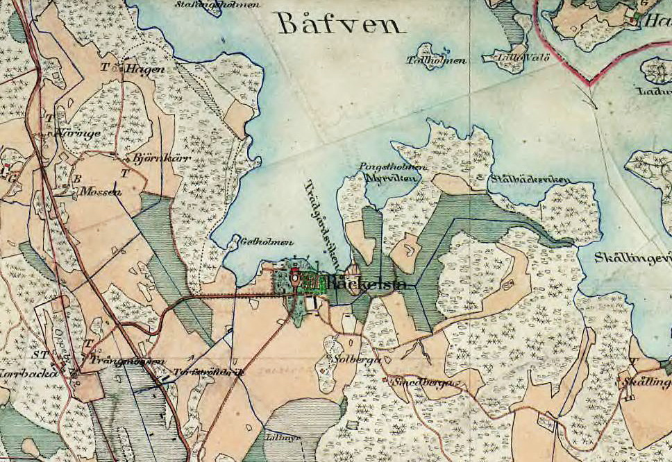 Råckelsta på Häradsekonomiska kartan